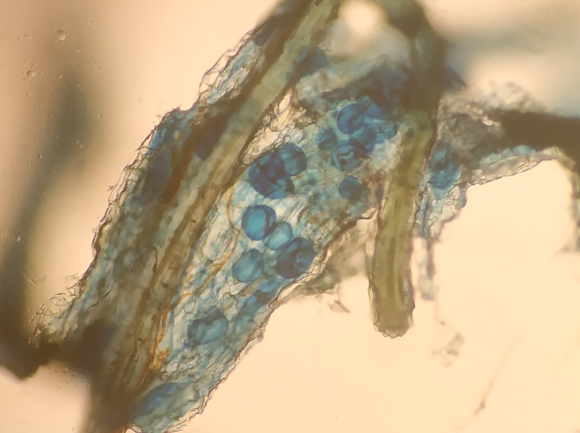 叢枝菌根的囊泡(使用台盼藍染色)